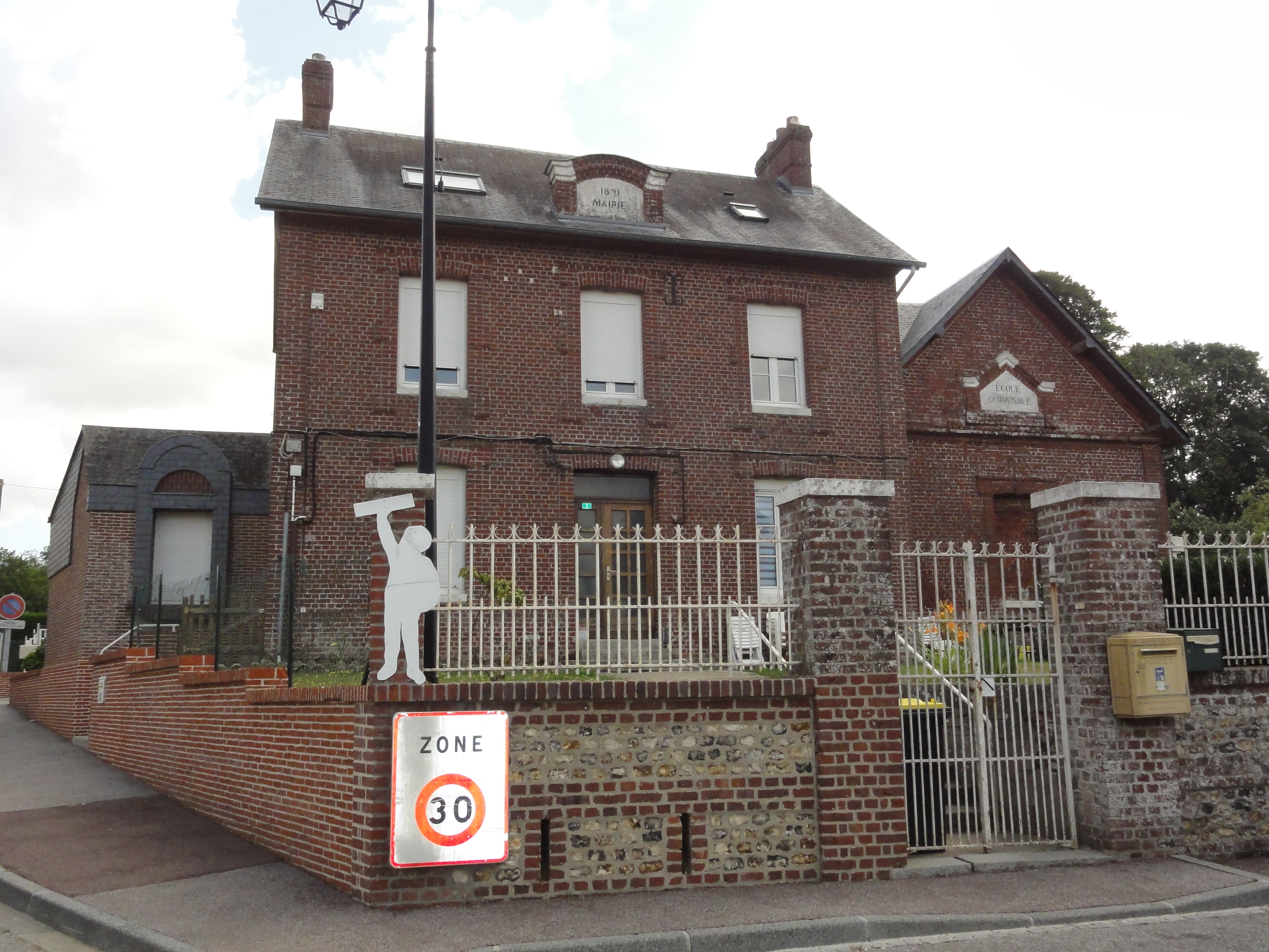 Le Saussay (Seine-Mar.) ancienne mairie-école